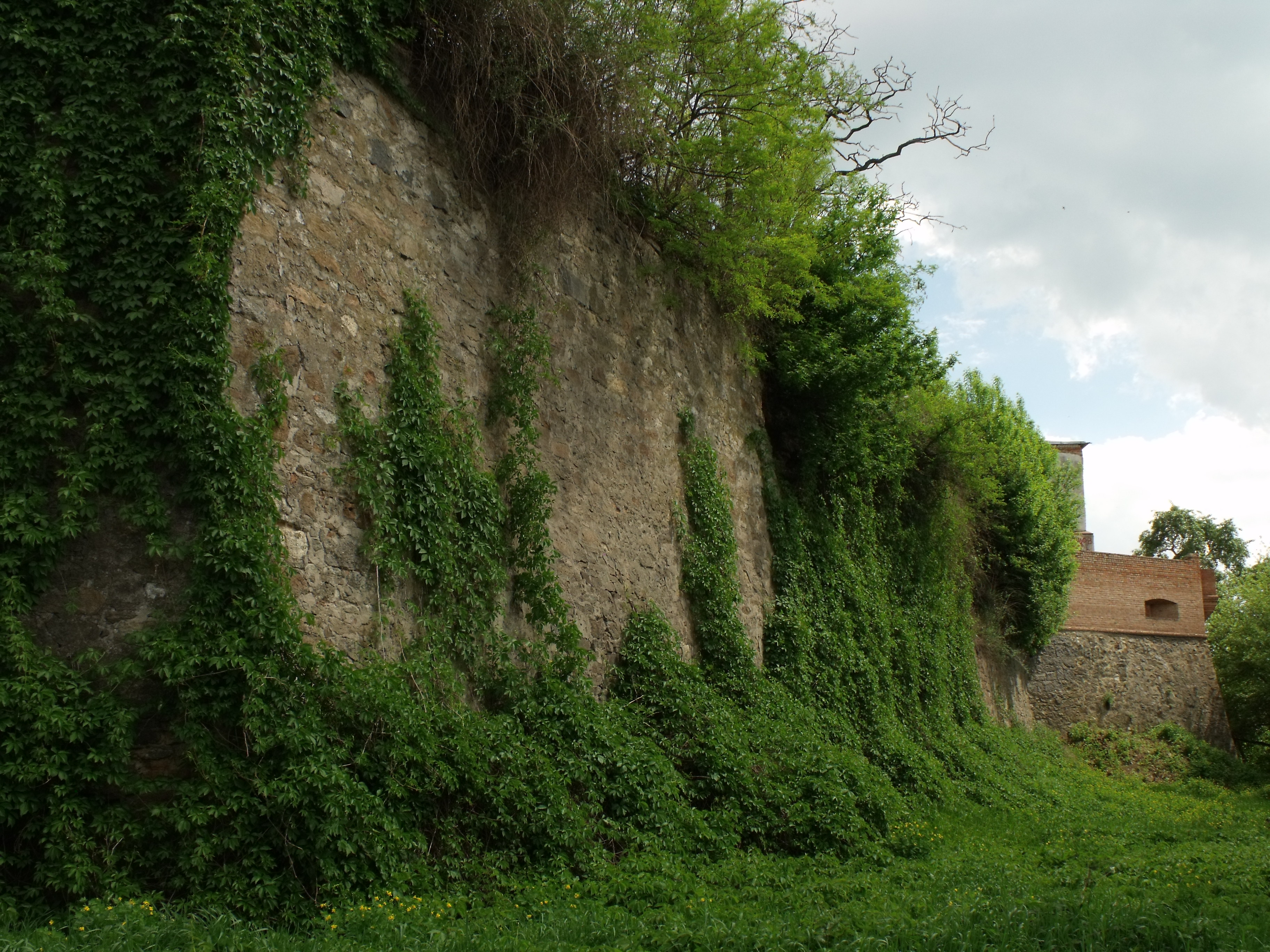 Фортечні мури з баштами та келіями: Бердичів, Радянська пл.